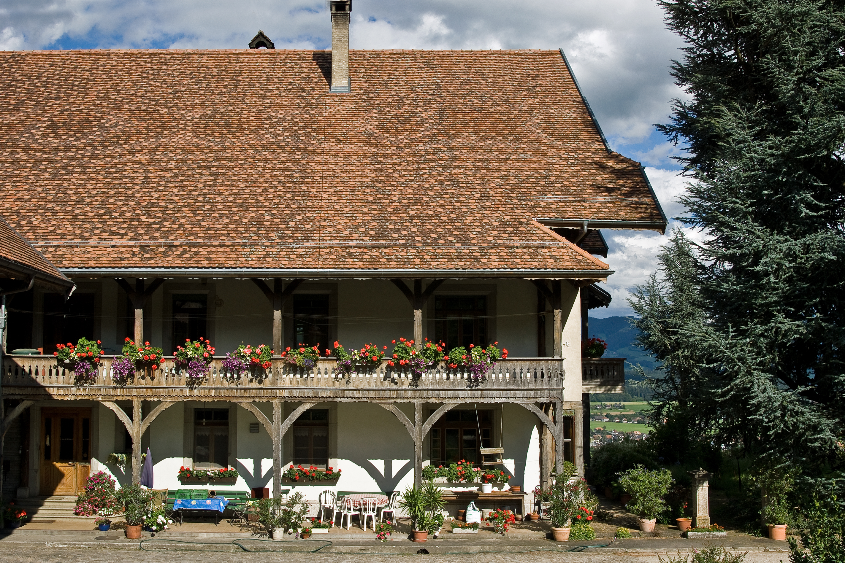 Herrenbauernhaus Rütimatt, Gerzensee Kt. Bern